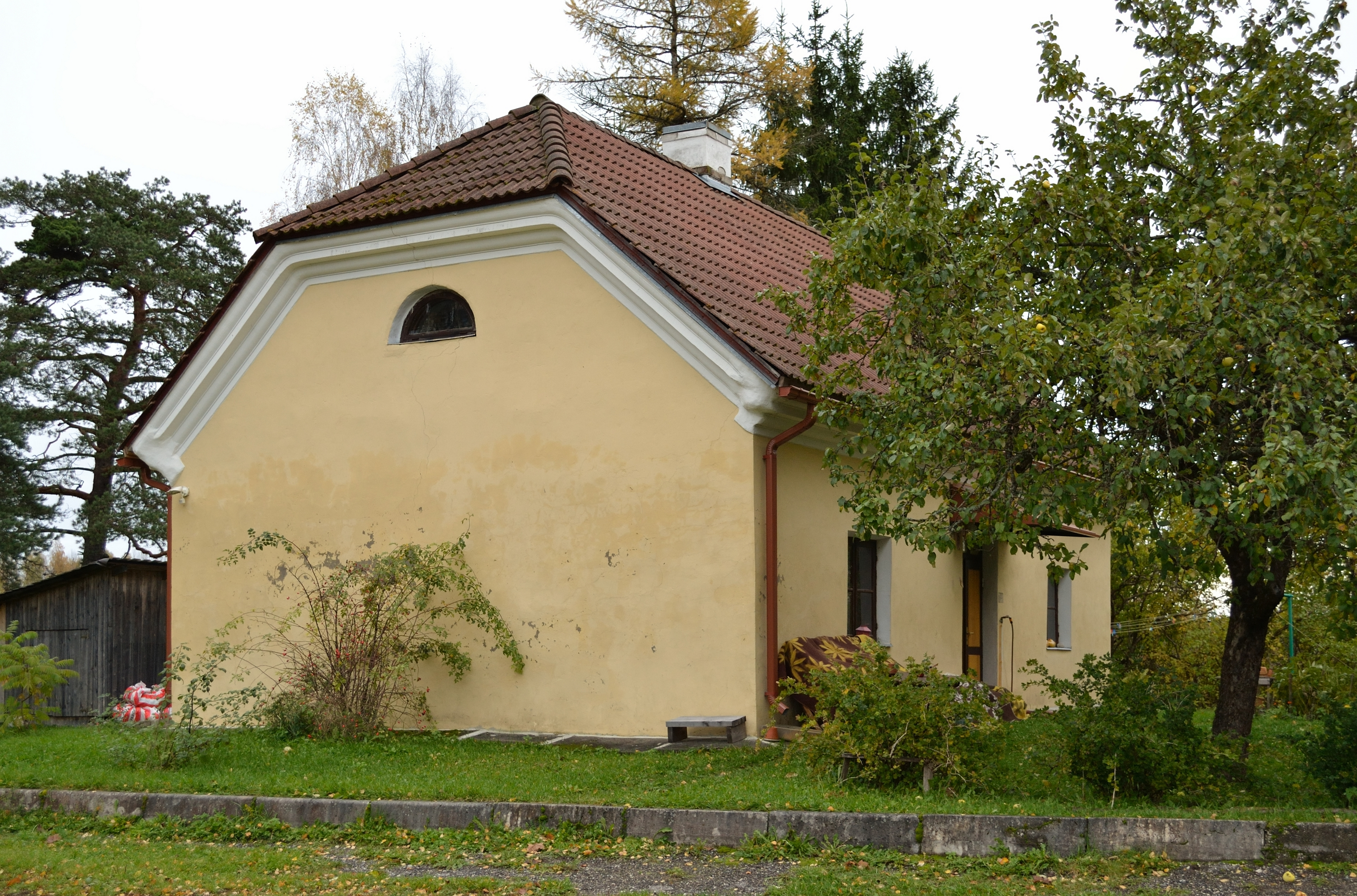 Ruunavere postijaama postipoiste maja